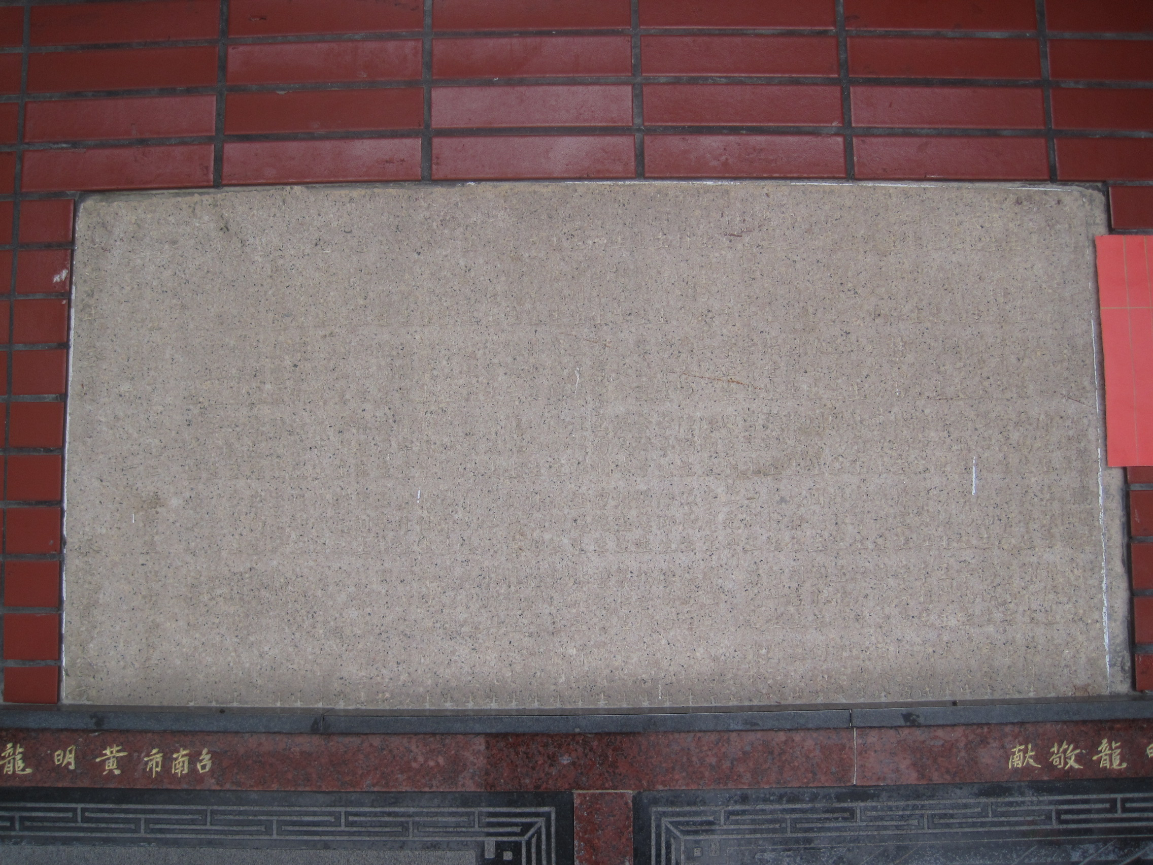 位於廟右的石碑